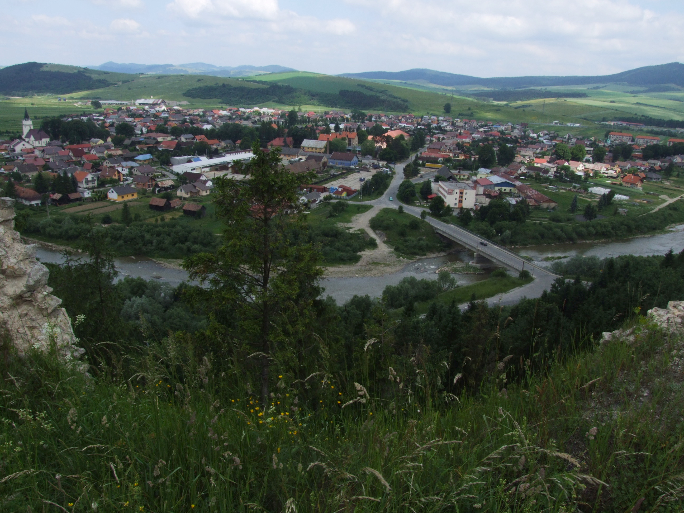 Plaveč